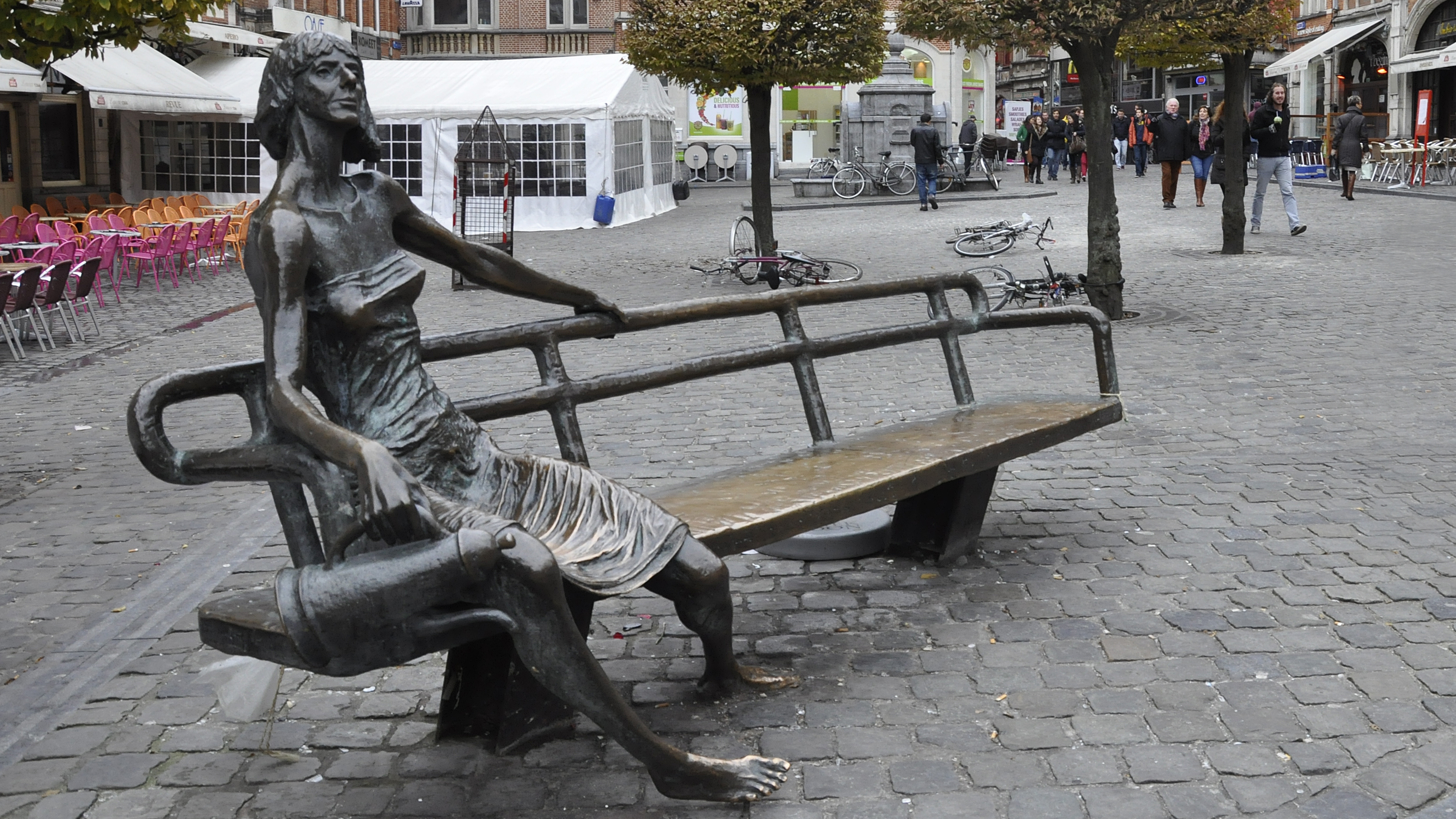 De kotmadam (Fred Bellefroid) Leuven Oude Markt 23-11-2013 This photo of immovable heritage has been taken in the Flemish Region